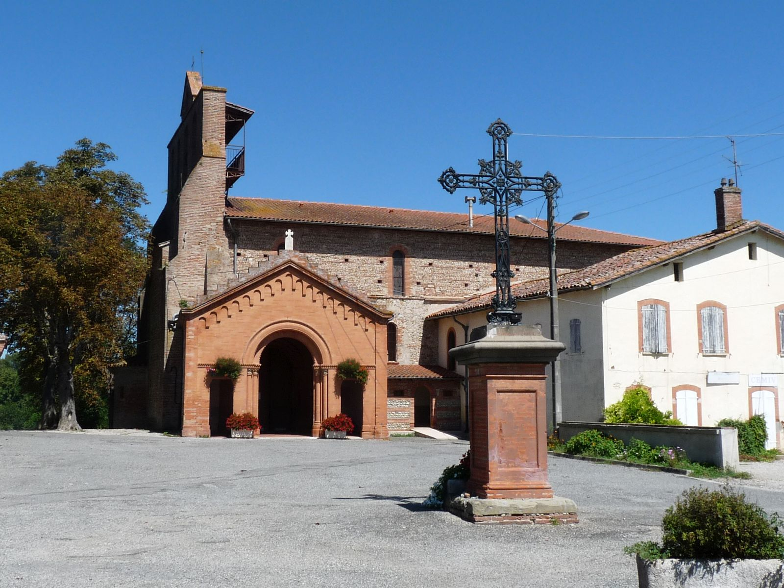 Eglise et croix de Vernet, Haute-Garonne, France